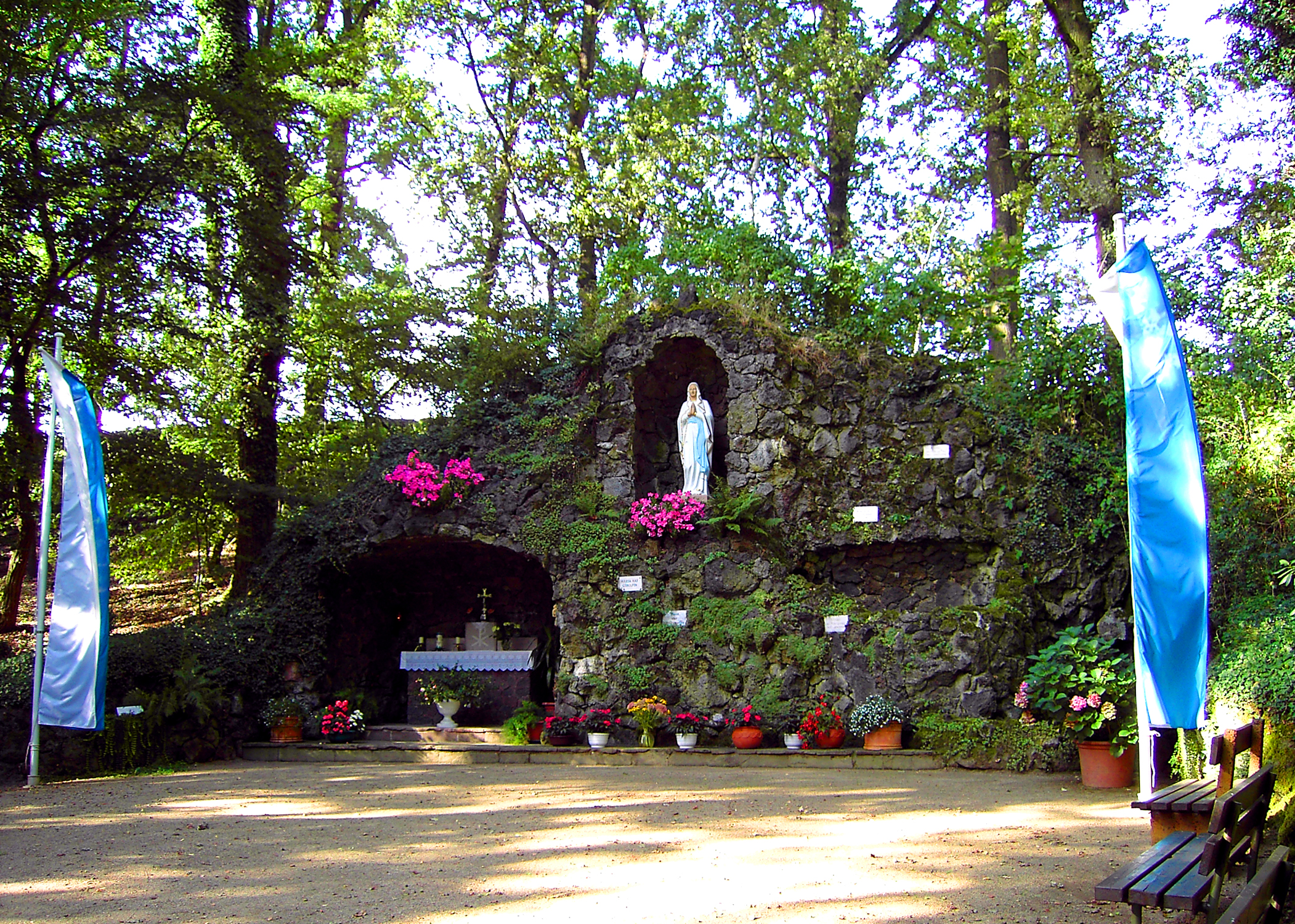 Mariengrotte in Rückers (Kreis Fulda), Deutschland